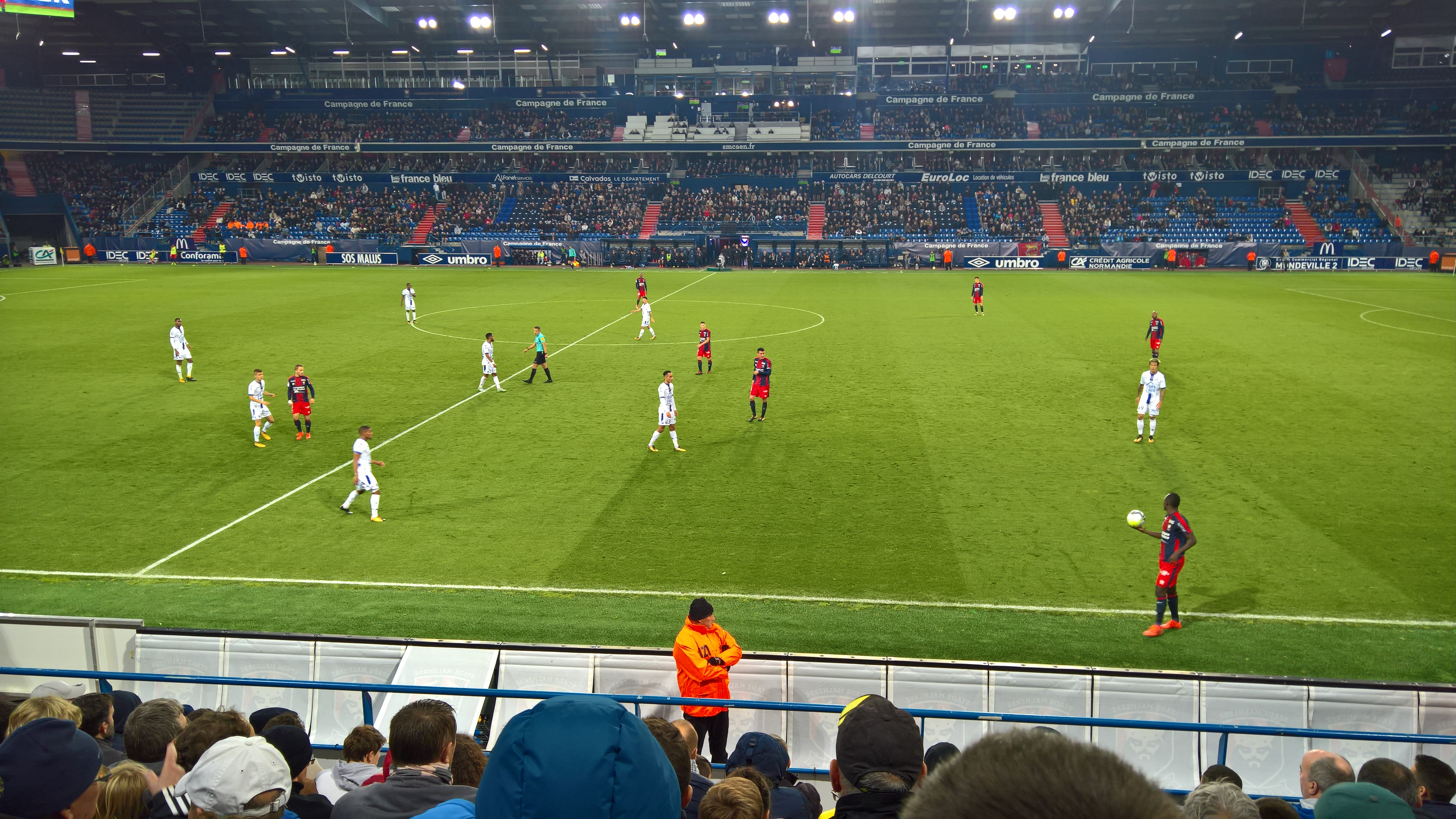 Scène du match de football opposant le SM Caen et l'ES Troyes AC (octobre 2017)